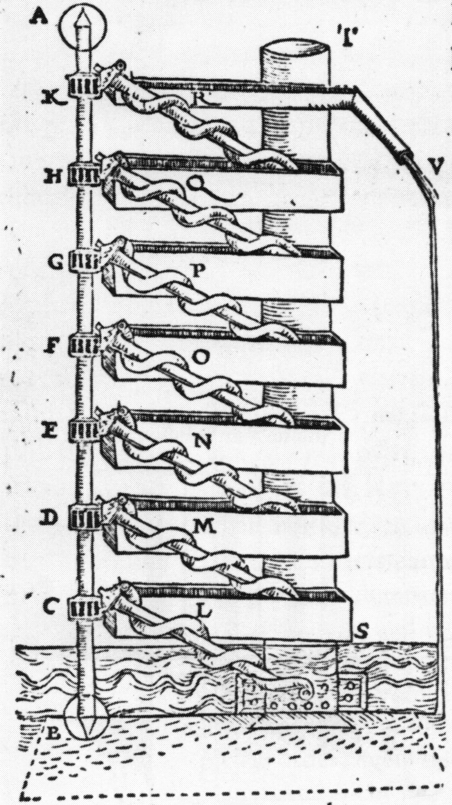 Schemazeichnung der Machina Augustana im Unteren Brunnenturm von Hieronymus Cardanus, 1554.